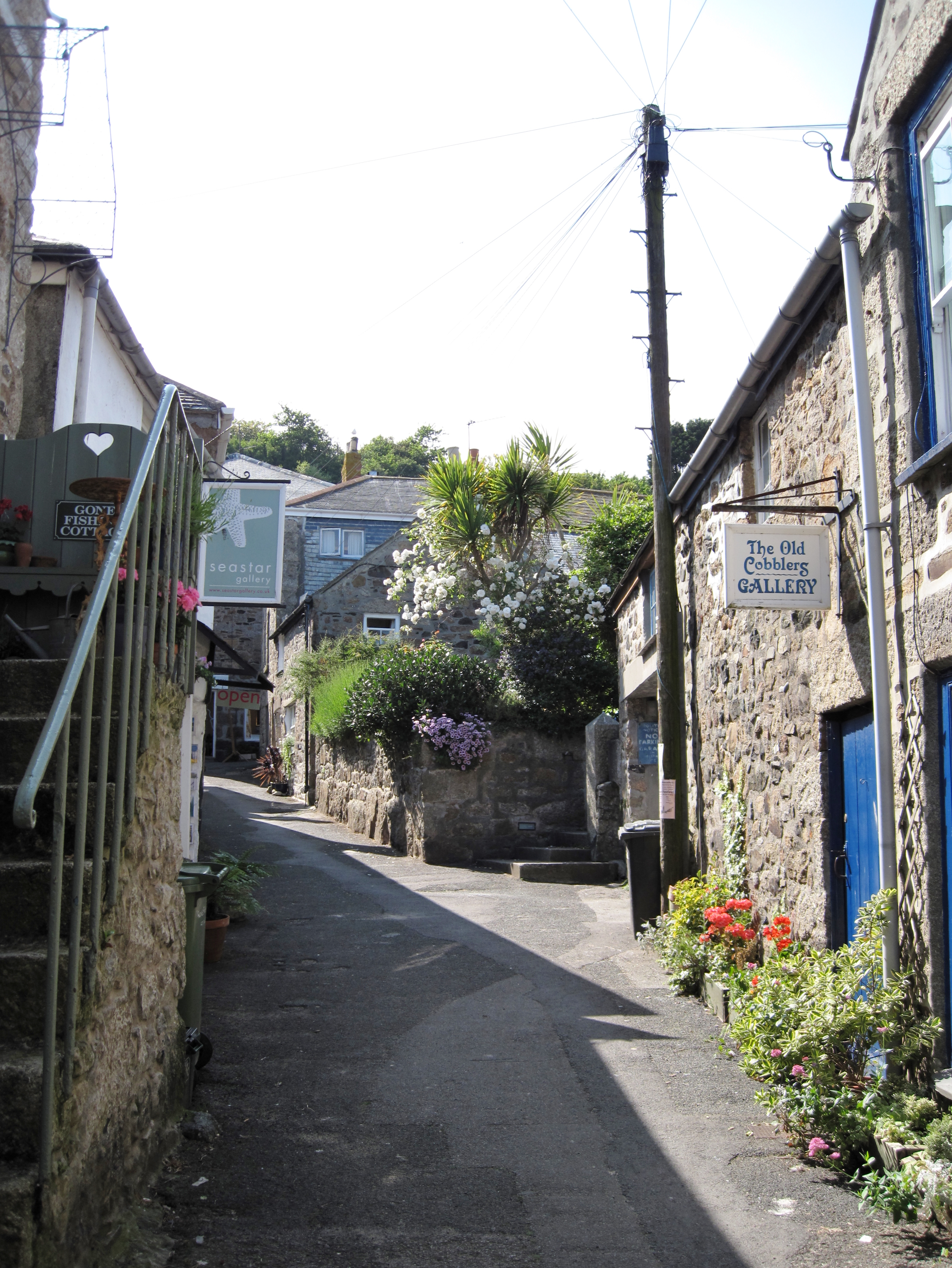 Straße in Mousehole an der Südküste von Cornwall, England